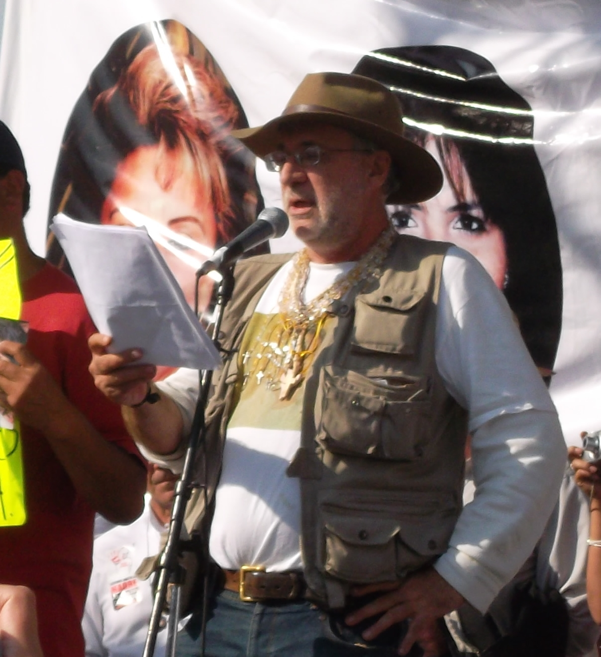 Javier Sicilia dando su discurso después de la marcha por la paz de Cuernavaca a la Ciudad de México el 8 de mayo de 2011.